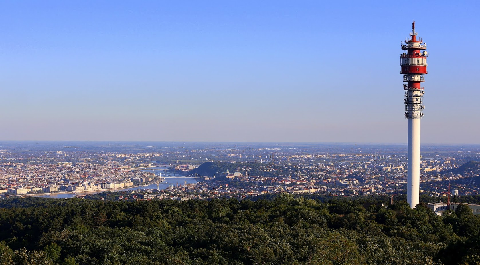 Kilátás a belváros felé